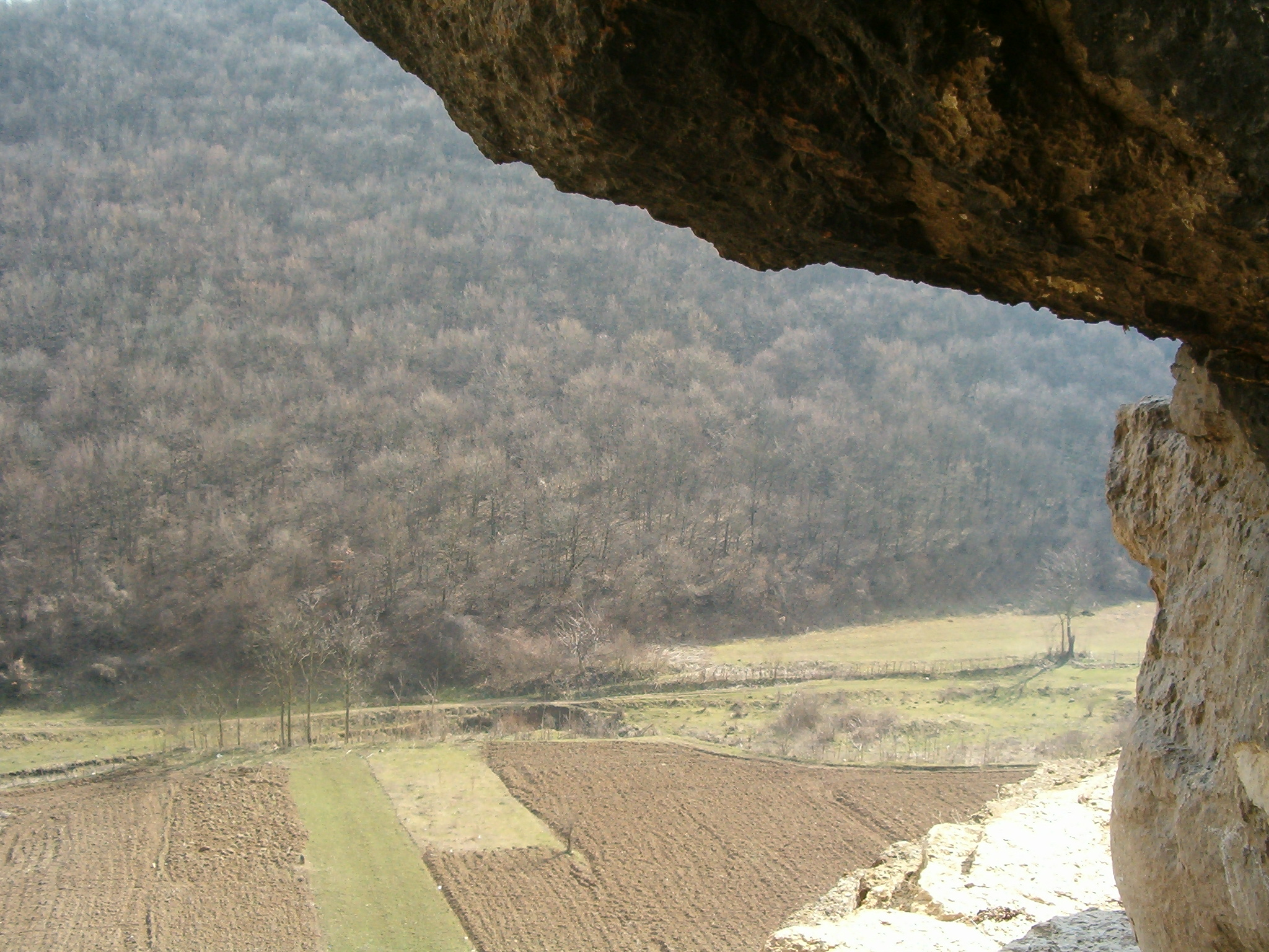 Поглед от първата тераса на скалния манастир до село Крепча към близката околност